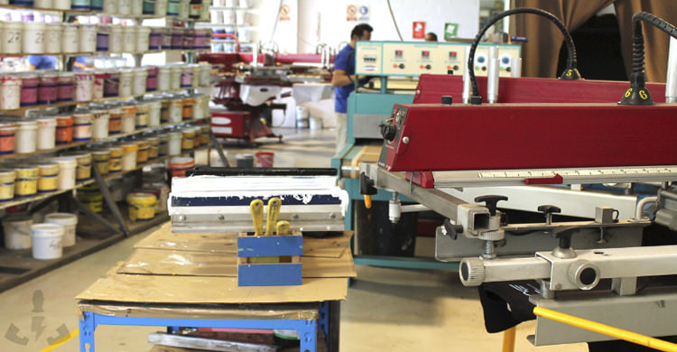 Foto general taller de estampación de camisetas en serigrafía. Se puede ver mesa de trabajo, pulpo de estampación y tintas de serigrafía.